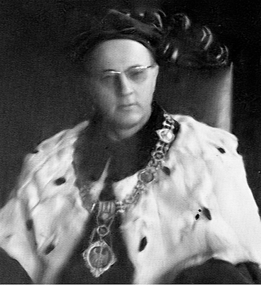 Gerard Labuda, profesor UAM.